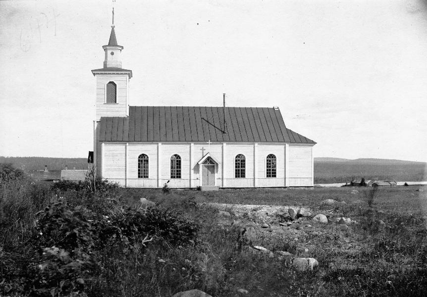 Kyrkan från söder.